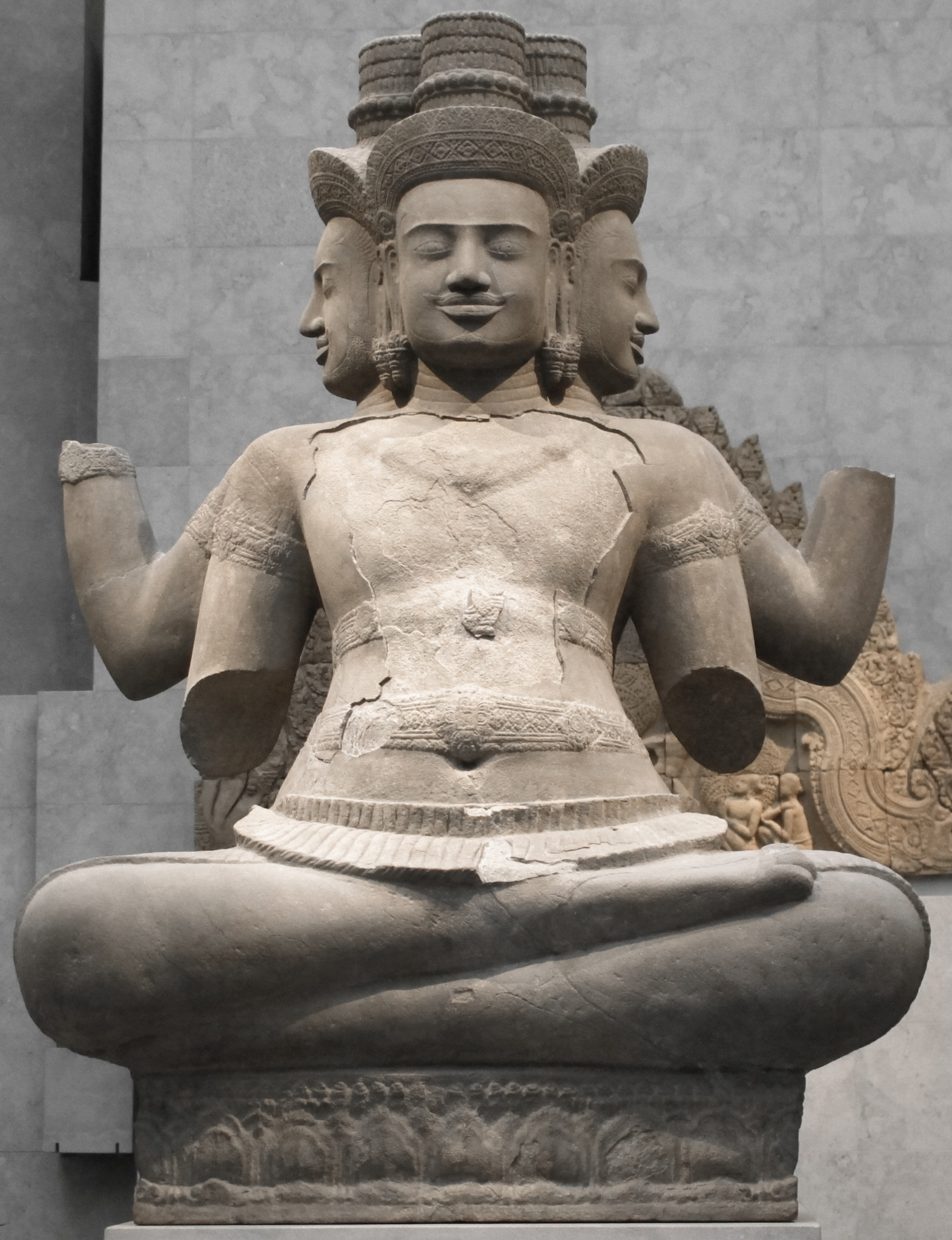 Cambogia, brahma, da dintorni di vat baset, stile di koh ker, 925-950 ca.